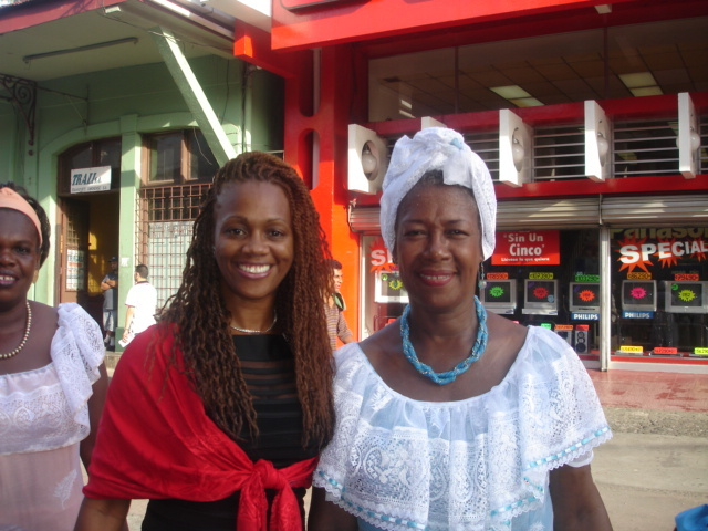 Epsy Campbell, diputada por el PAC, en Limón, Costa Rica.